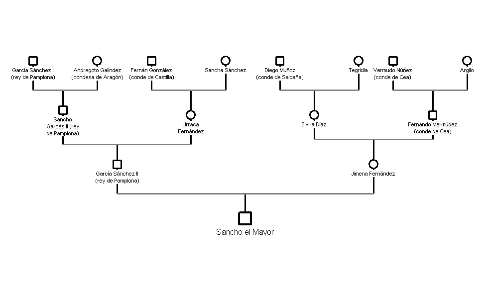 Antepasados de Sancho el Mayor, rey de Pamplona.